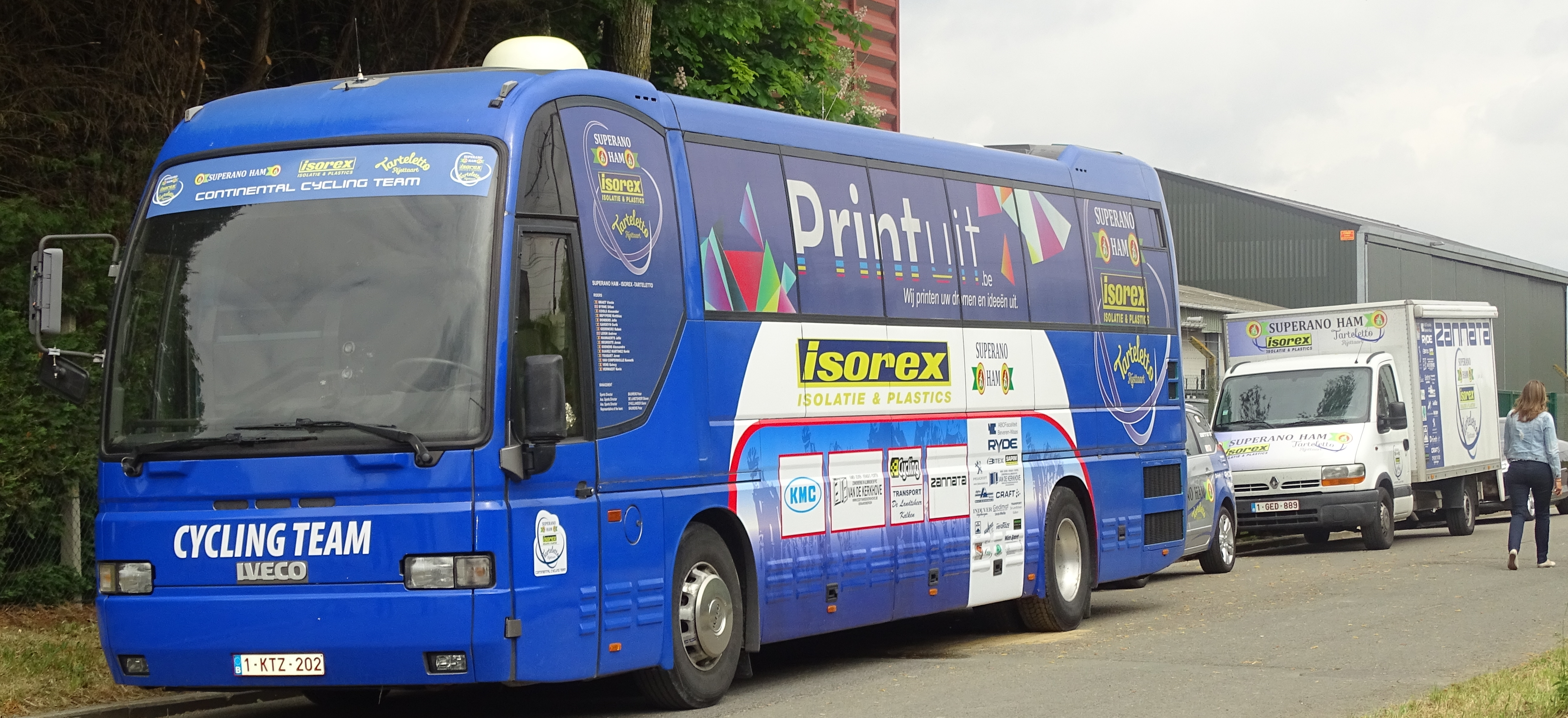 Reportage réalisé le dimanche 15 mai à l'occasion du départ du Grand Prix Criquielion 2016 à Silly, Belgique.